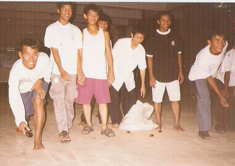 Juegos tradicionales camboyanos Trabajo personal de Albeiro Rodas: muchachos camboyanos juegan Onkuy, un deporte tradicional del país. Donación a la wikipedia.